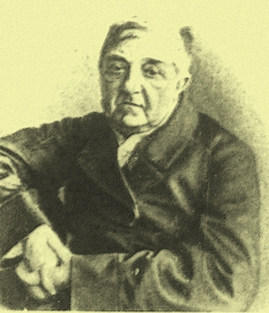 профессор астрономии Перевощиков, Дмитрий Матвеевич